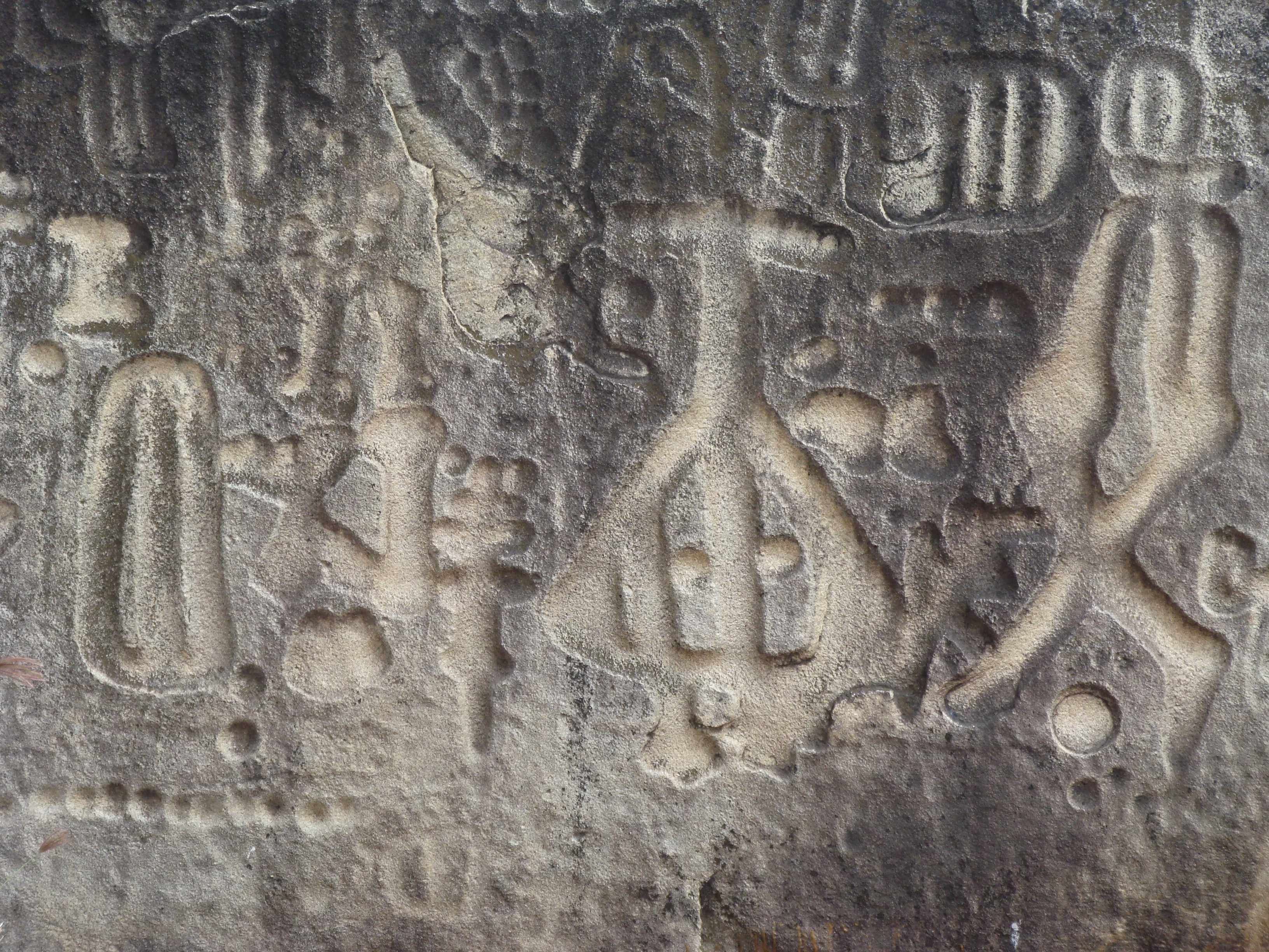 Pedra do Ingá - Paraíba - Brasil